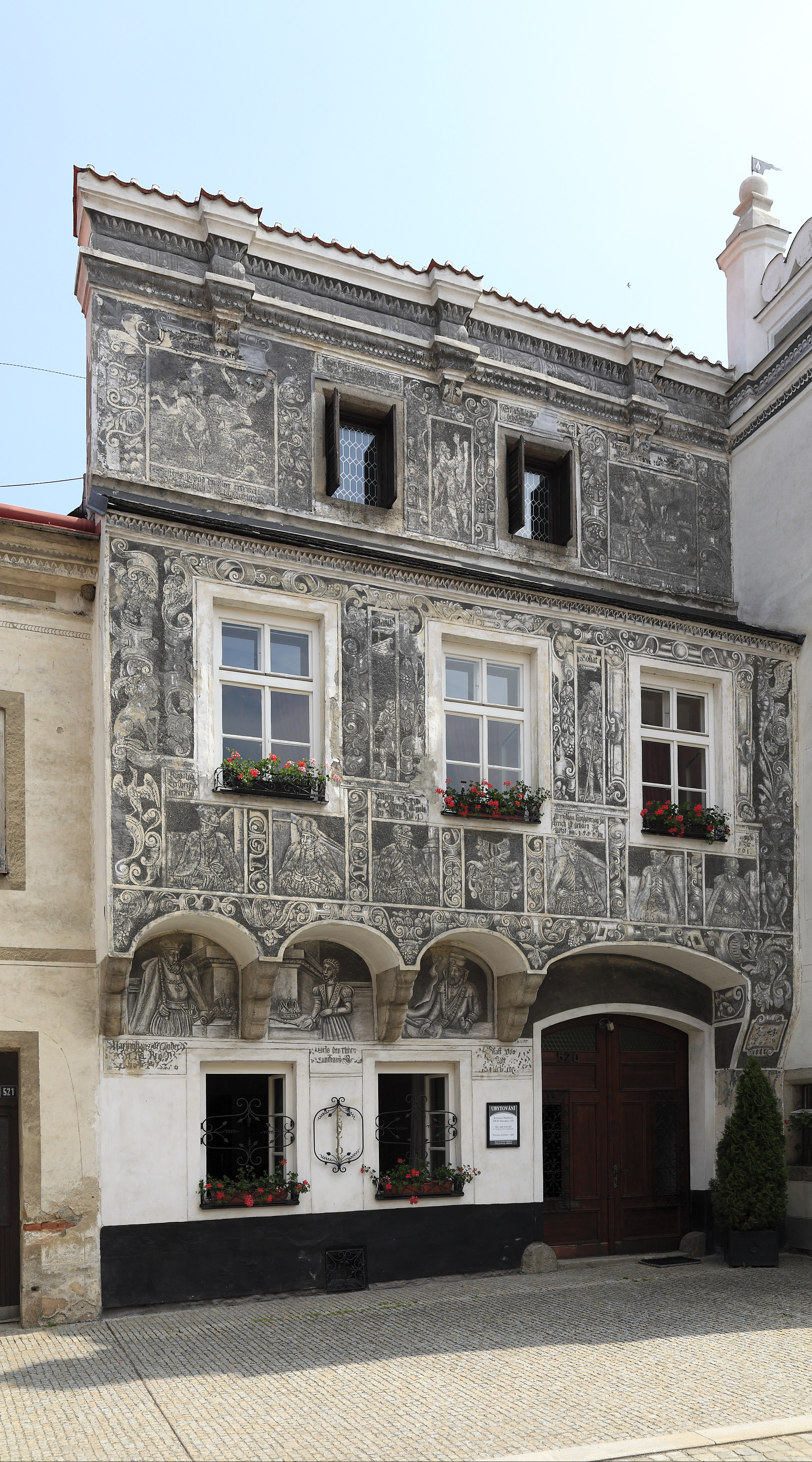 Ebenfalls eine der prächtigen Sgraffitofassaden am Obermarkt, am Haus 520 sind es allerdings keine biblischen wie an den Häusern 537 und 538, sondern weltliche Motive in Form von Herrschern und ihren Angehörigen.